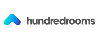 Logotipo de